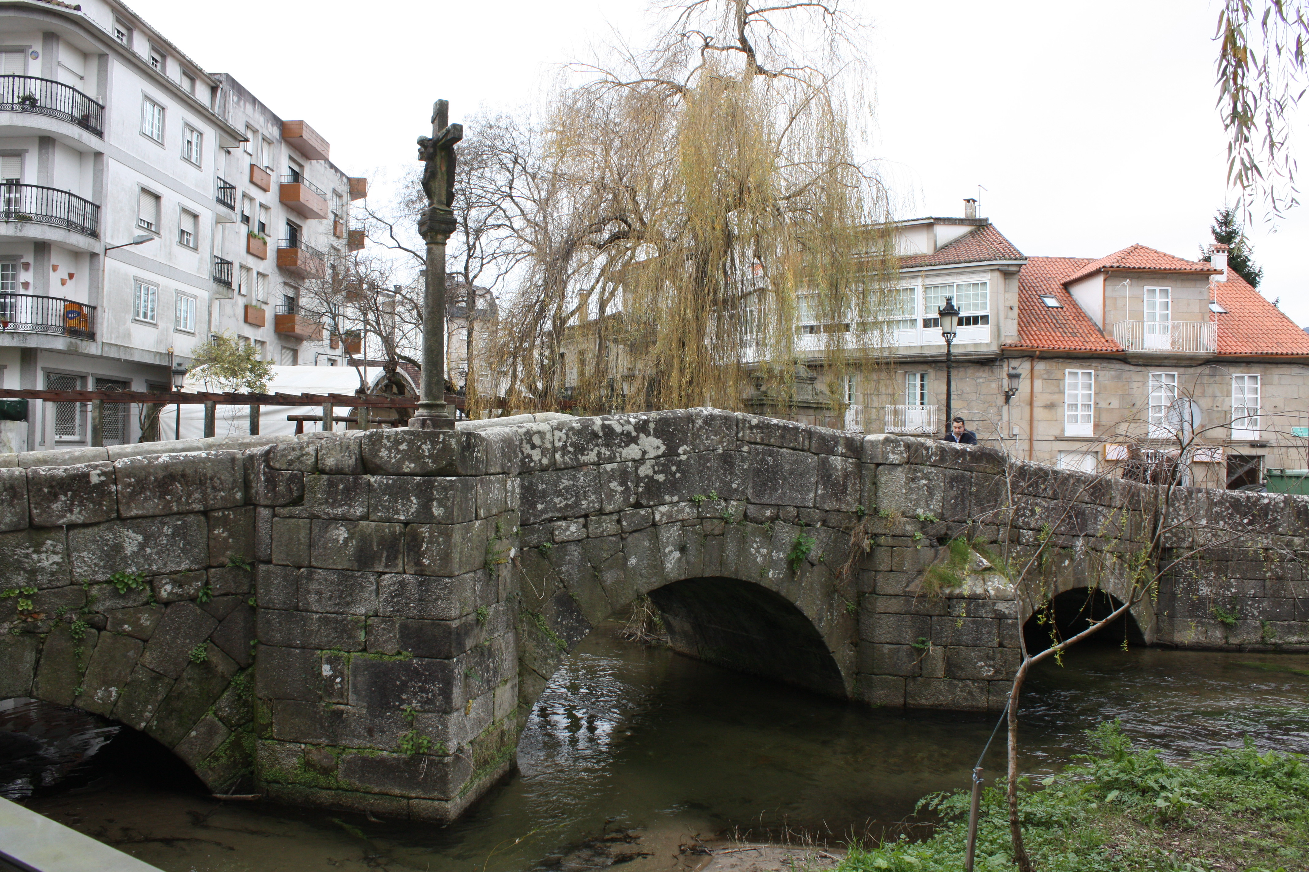 Ponte romana (62 aC - 409 dC) en Caldas de Reis, Pontevedra, sobre o río Bermaña